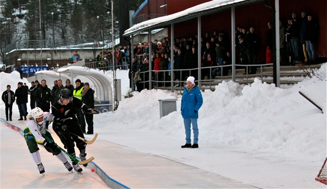 Annandagsmatch den 26 december 2012 mellan Helenelunds IK och Norrtelje BF (3-5) på Sollentunavallen. Foto: Bengt Jörnåker